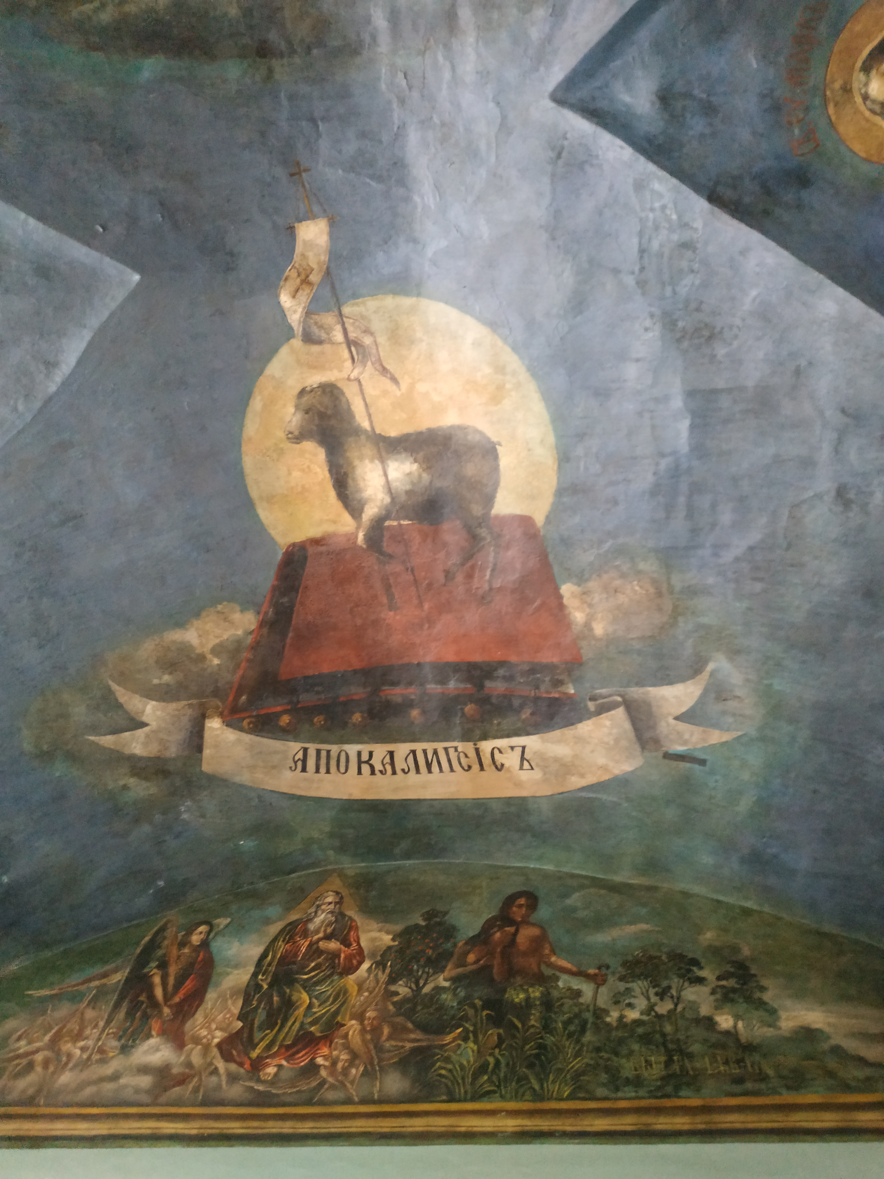 апокаліпсис - ікона Ісус Агнець (Видубицький монастир)